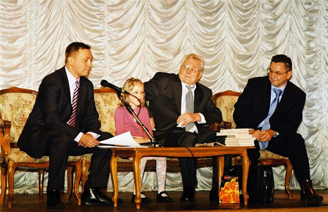 Sergey Kara-Murza (Кара-Мурза, Сергей Георгиевич) in 2009